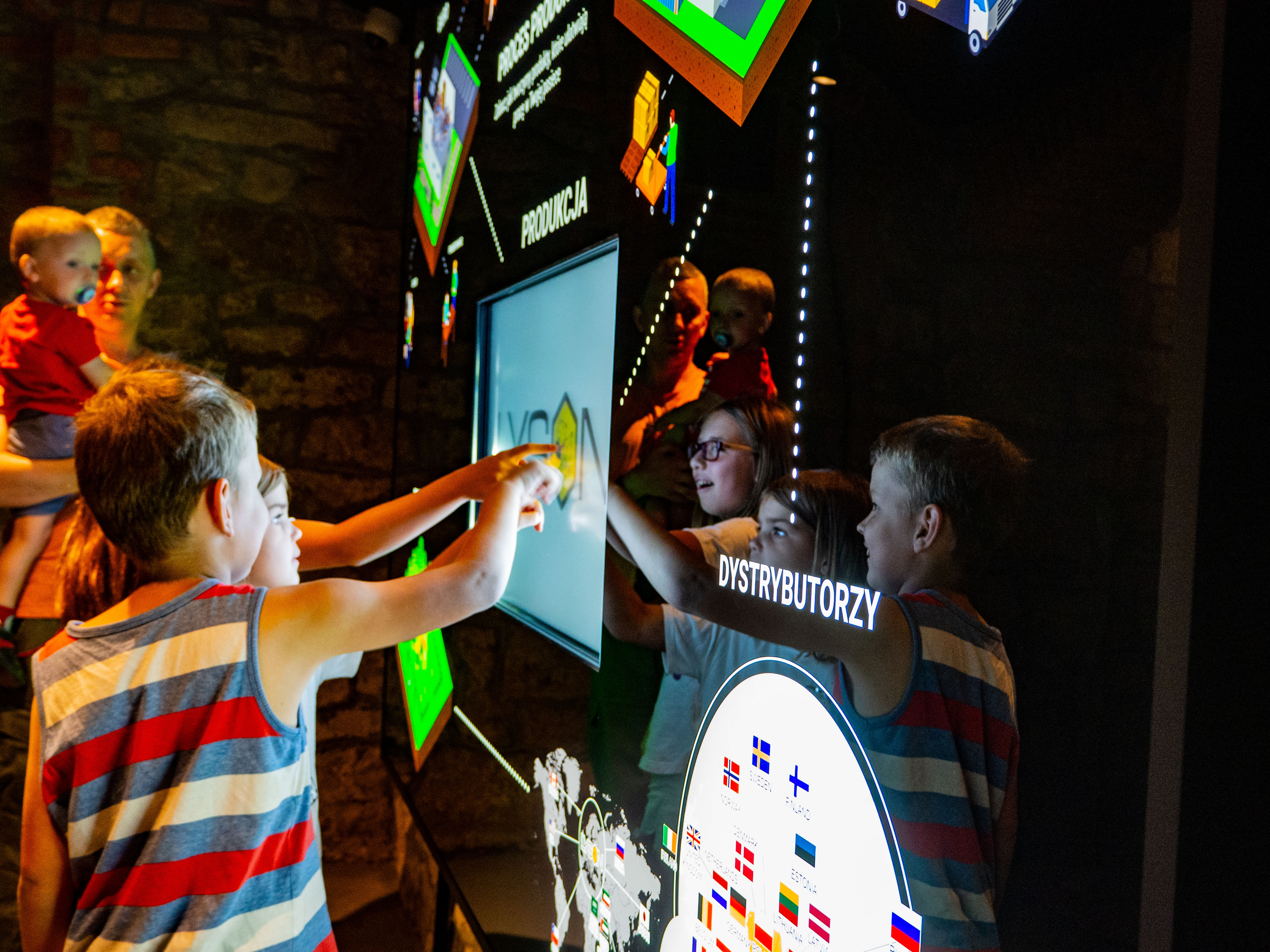 apilandia interaktywne centrum pszczelarstwa klecza dolna interactive beepeeping centre